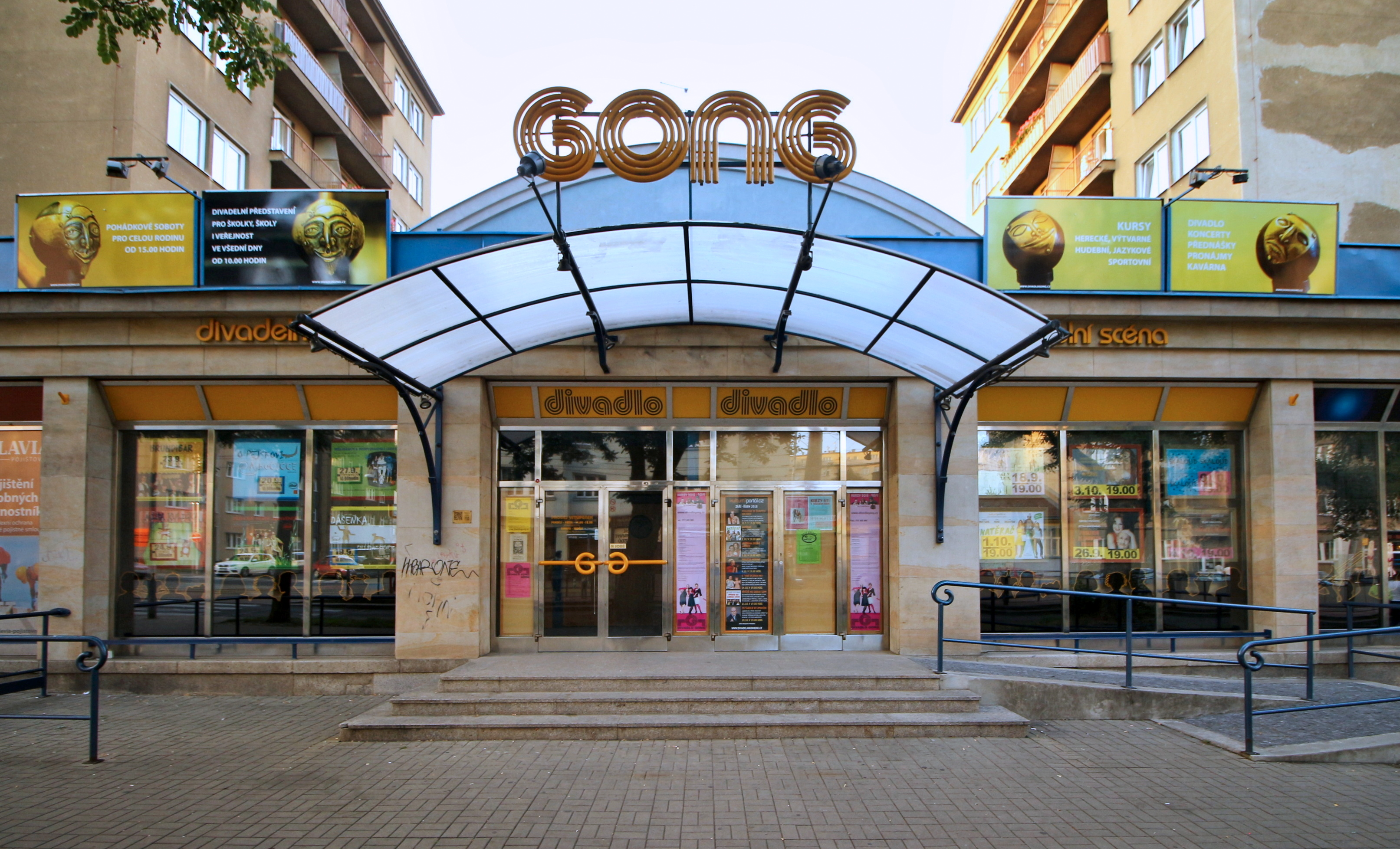 Praha 9-Libeň, Sokolovská ulice - Divadlo GONG